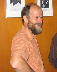 Foto di Dugald Macpherson (sinistra) e Cohen, Arjeh M. (destra)